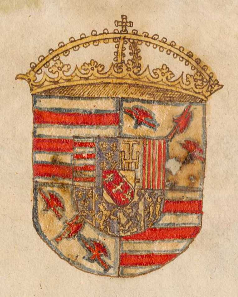 Wappen Carl Philipp von Croy (Charles Philippe de Croÿ, † 1613, Marquis d’Havré, am 6. August 1594 in Regensburg in den Reichsgrafenstand aufgenommen)